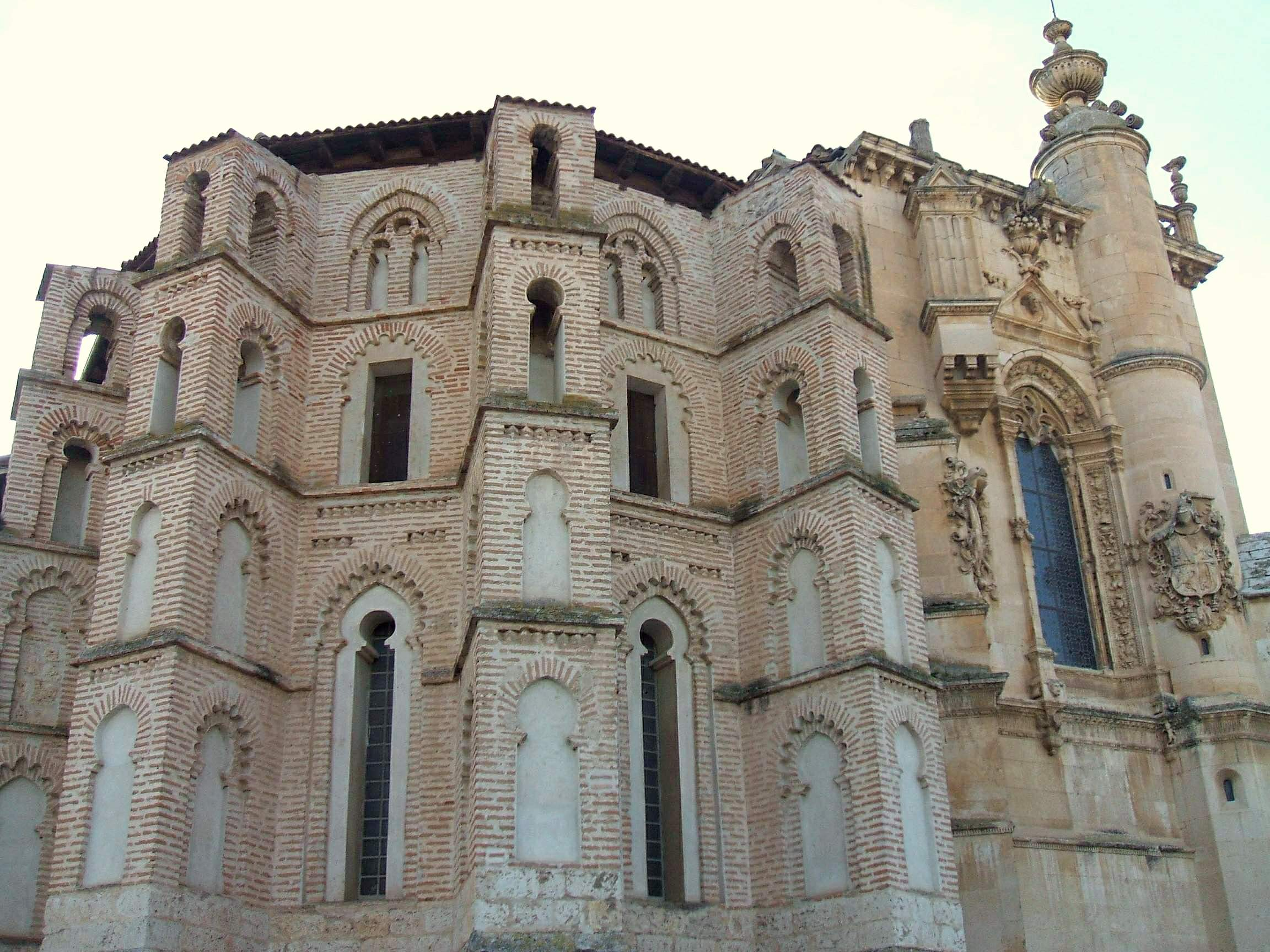 Convento e iglesia de San Pablo, Peñafiel (Valladolid)